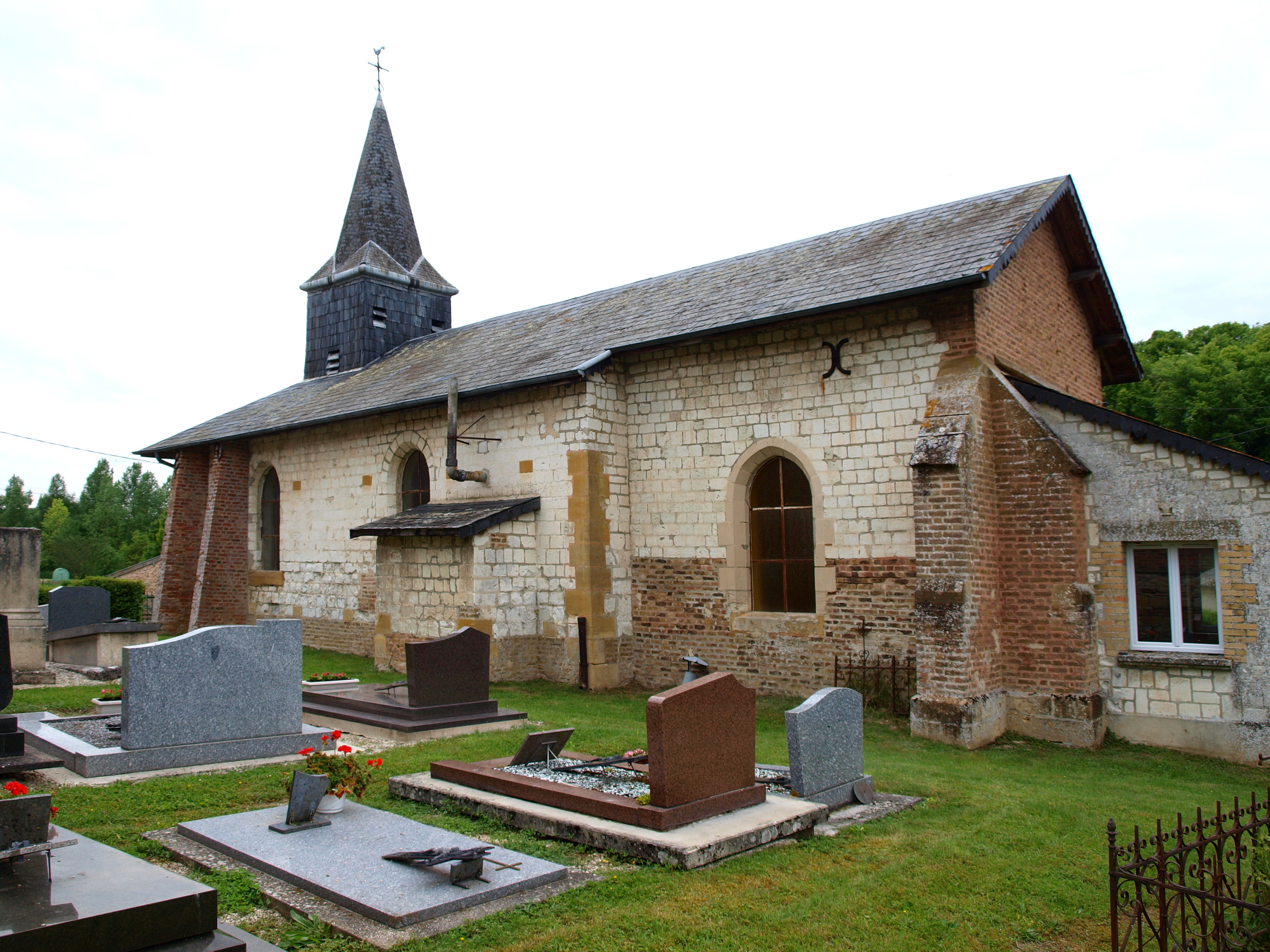 Aure (Ardennes , France) ; église